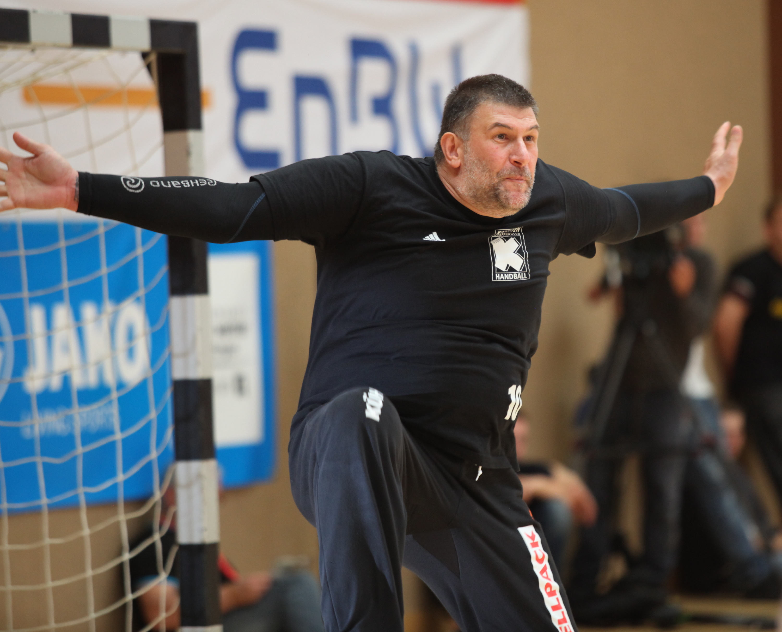 Nenad Puljezević, Handballtorwart der Kadetten Schaffhausem am 16. August 2014 beim Sparkassen-Cup in Ehingen.